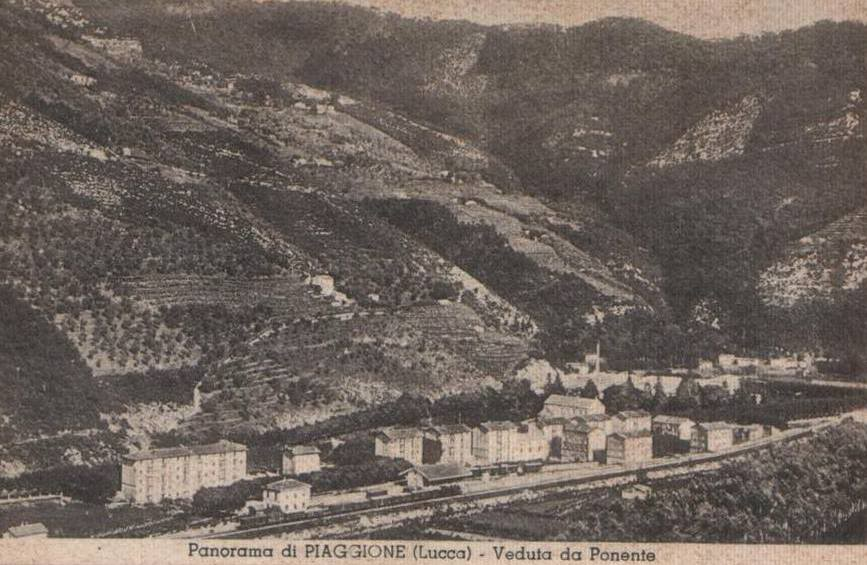 Veduta aerea della stazione ferroviaria di Piaggione